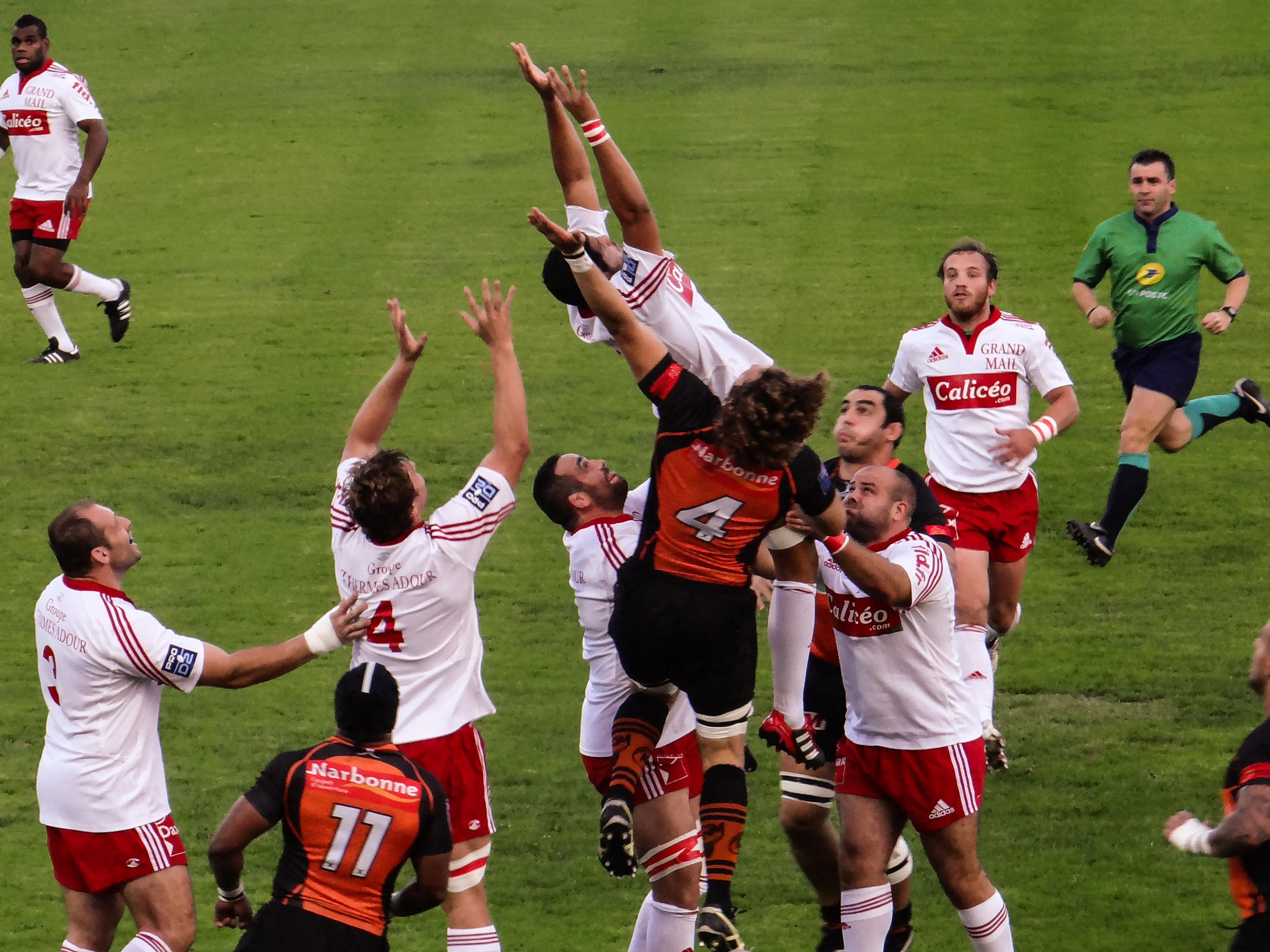 Pro D2 2013-2014 — 19 October 2013, Stade Maurice-Boyau. Match between: US Dax — RC Narbonne Méditerranée